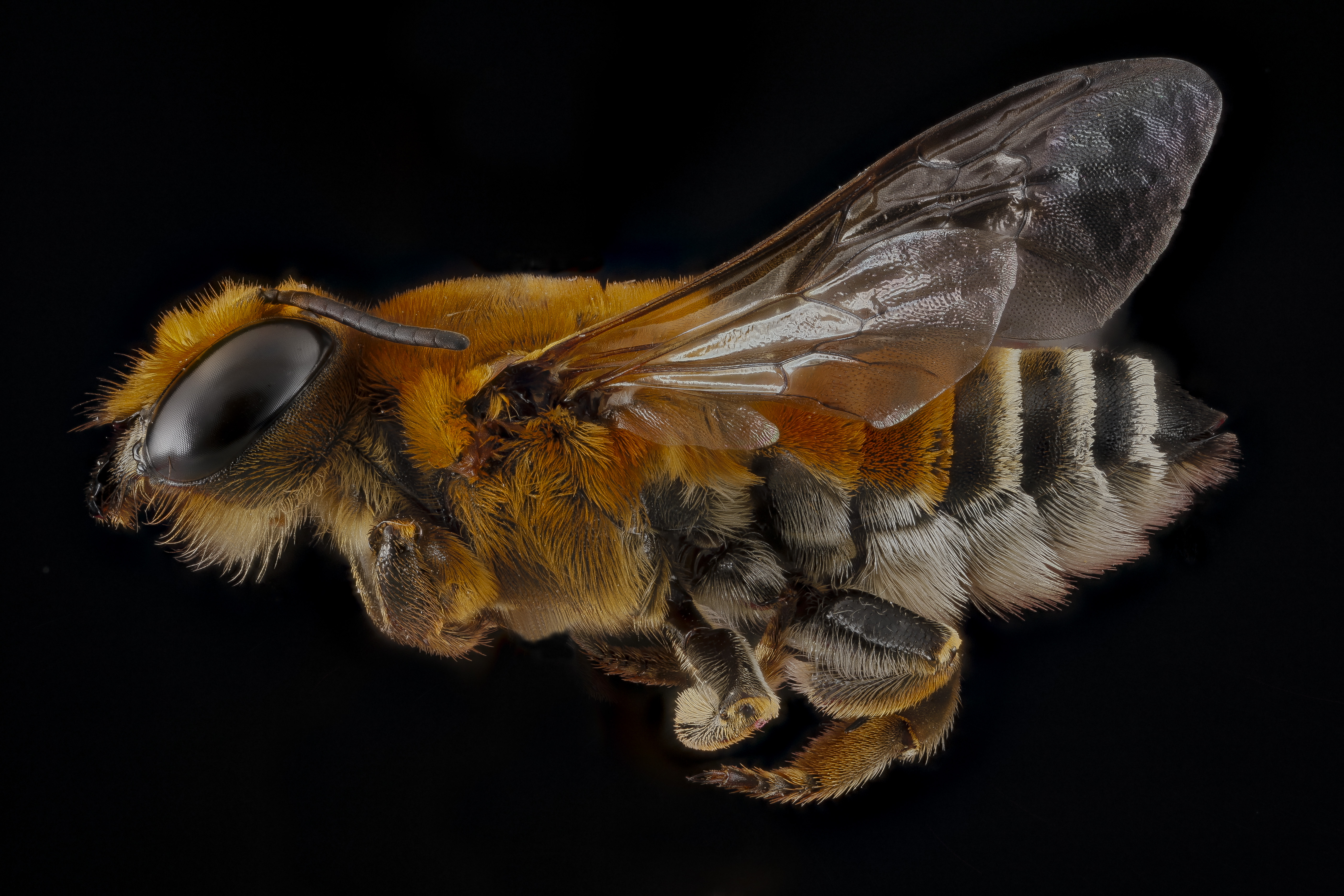 Megachile lanata, GTMO Cuba, Female